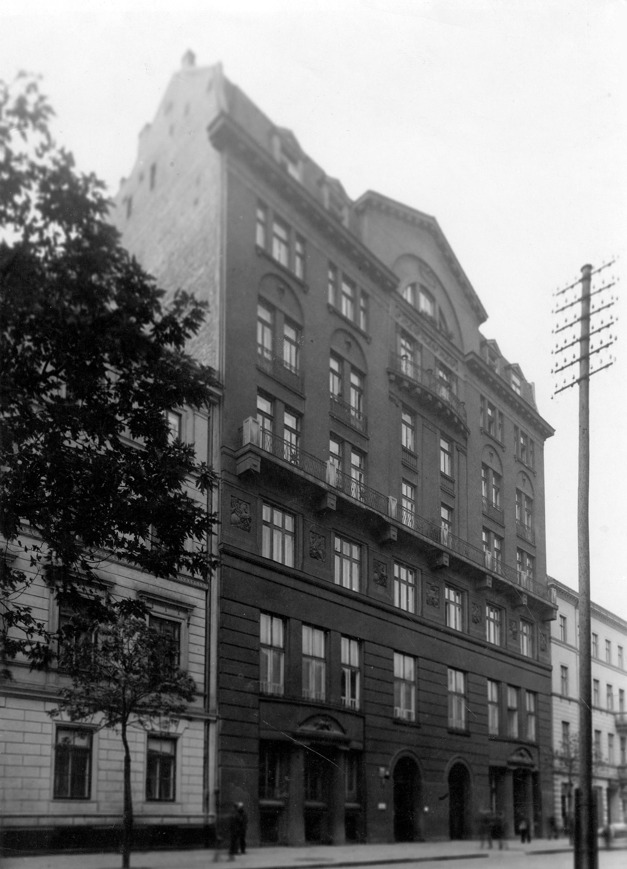 Przedwojenny budynek Polskiego Radia, znajdujący się przy ulicy Zielnej 25